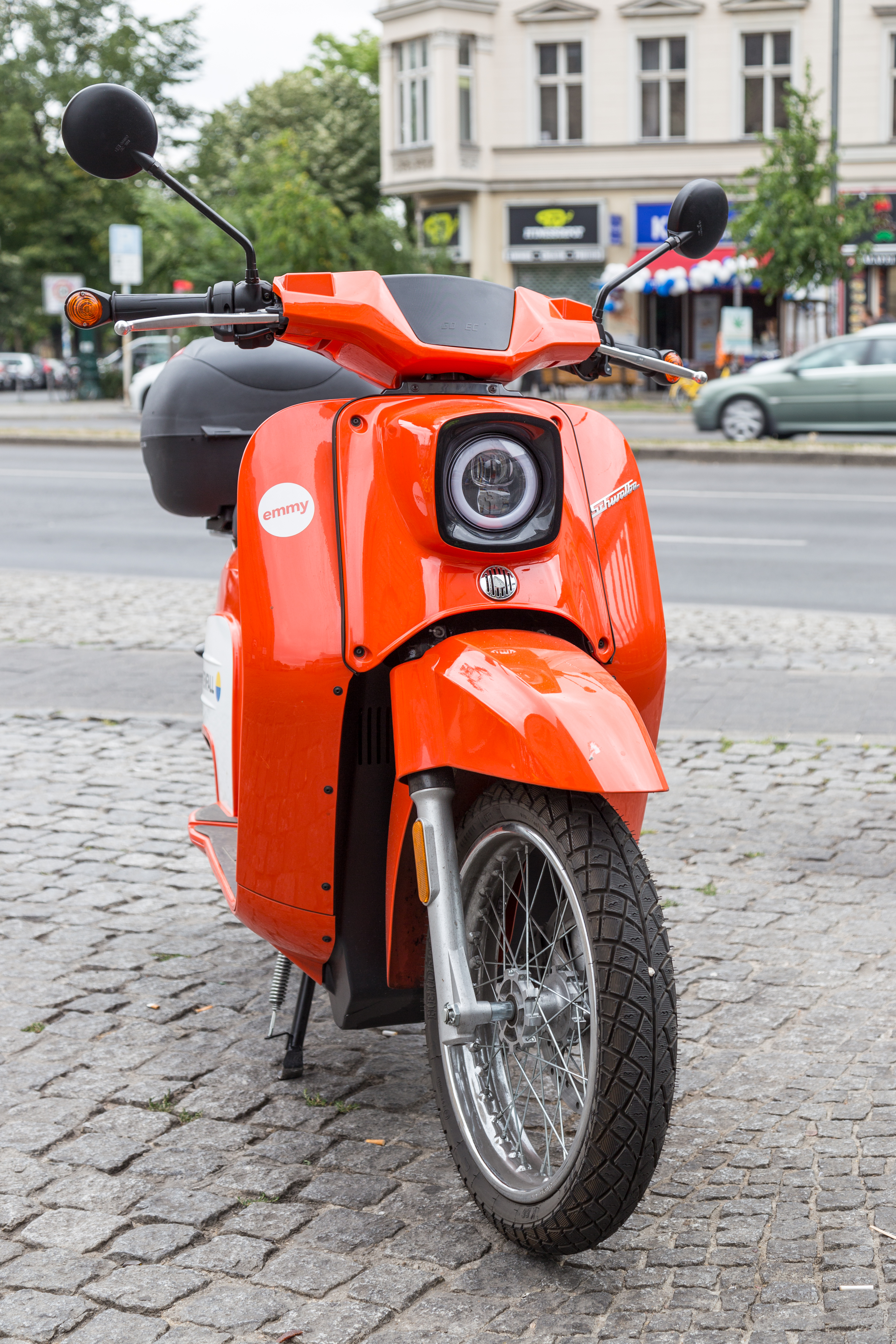 Aus der Gattung der "Schwalbeartigen": Govecs Electric Scooter.